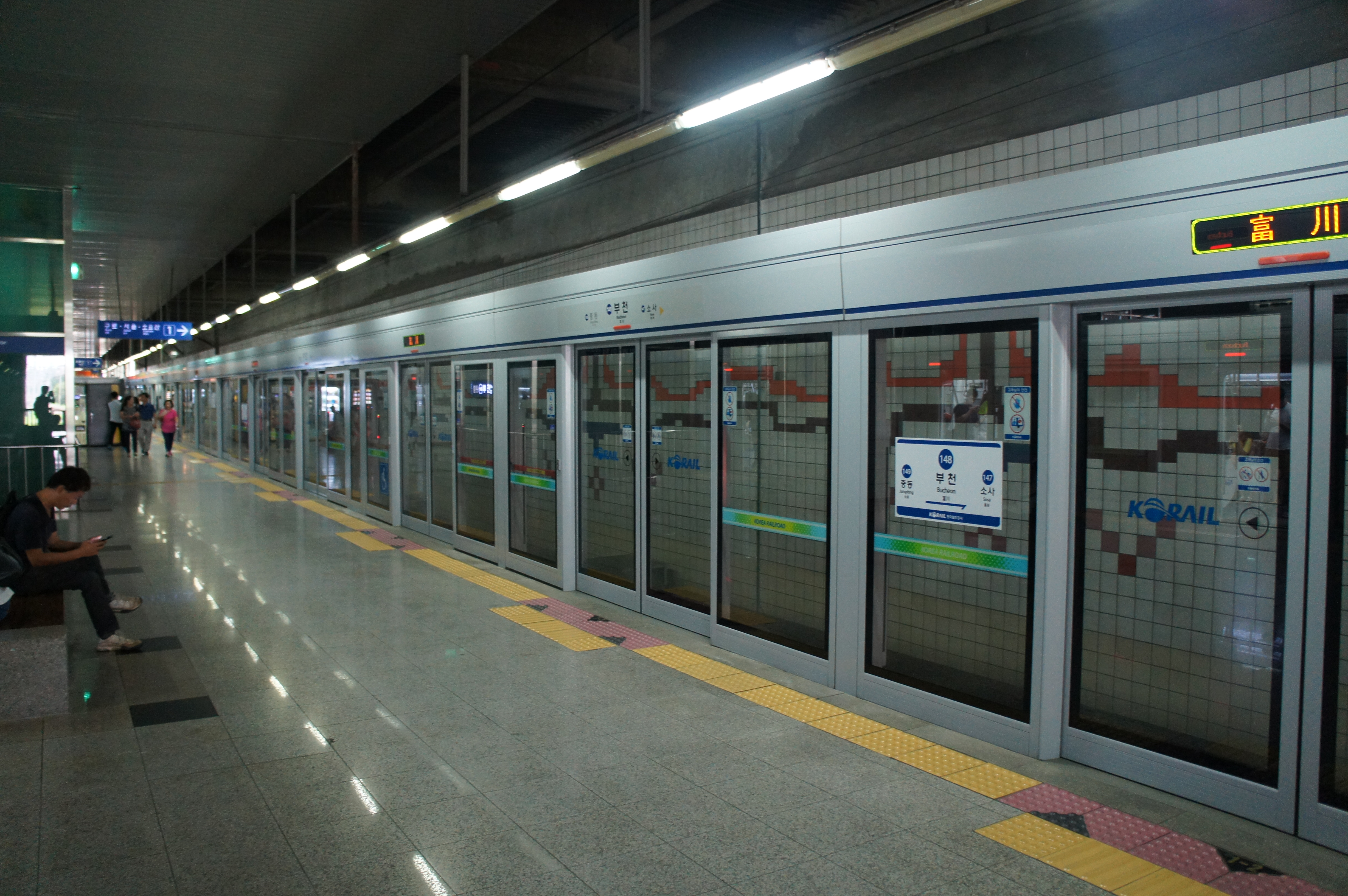 부천역 승강장